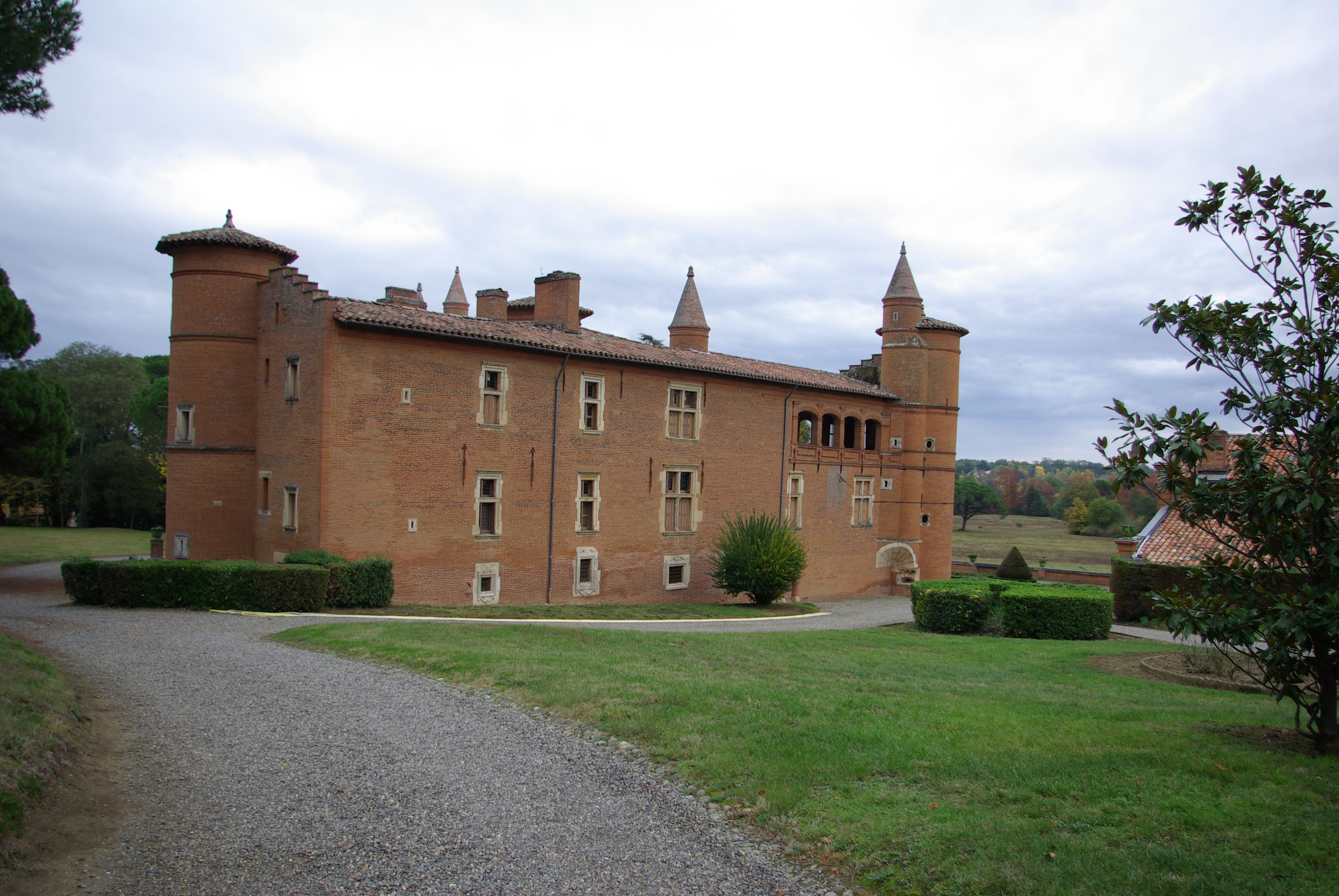 Château de Pibrac (Haute-Garonne, France).